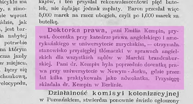 Fragment dotyczący feminatywu "doktorka" w czasopiśmie "Wędrowiec" 1896, numer 11, strona 212